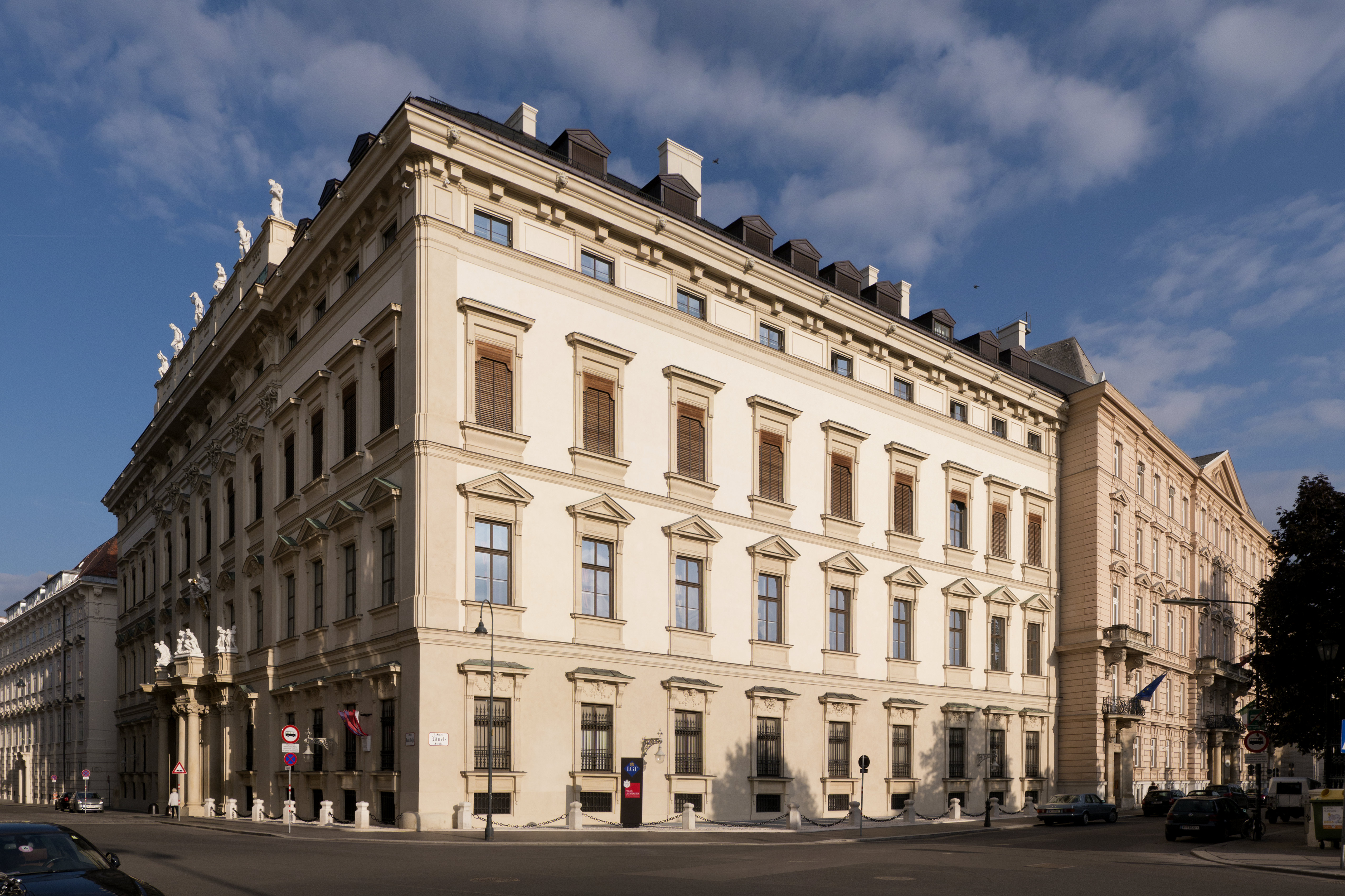 Wien Stadtpalais Liechtenstein